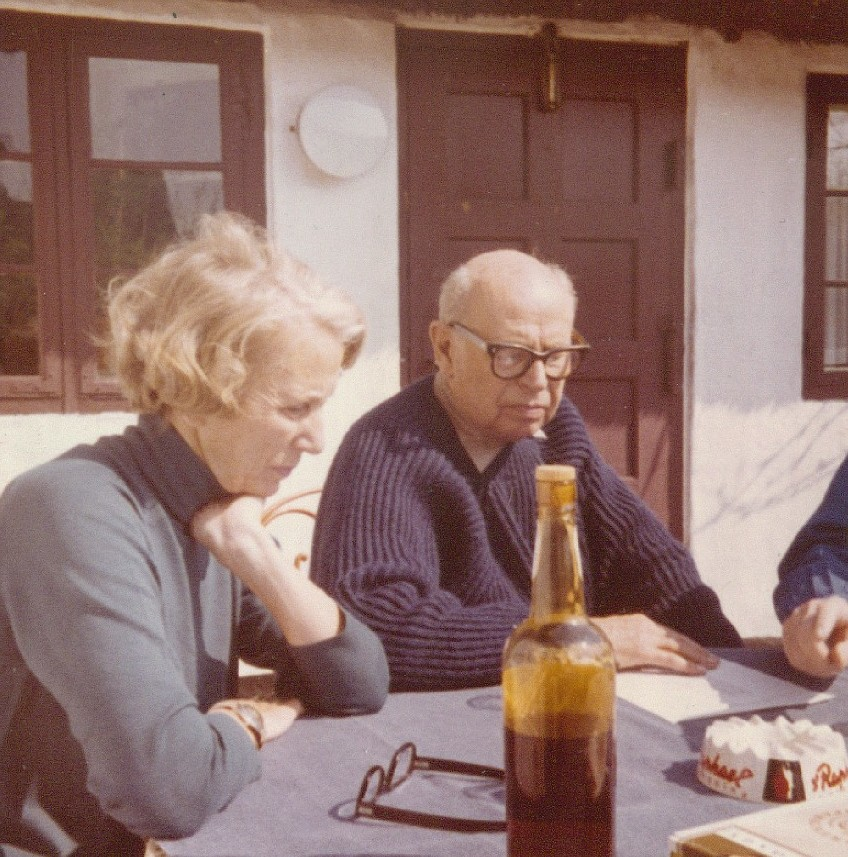 Henningsen, Poul (1894-1967) arkitekt, kritiker, forfatter; Henningsen, Inger f. Andersen (1904-1996) Lokalitet: Danmark, Kokkedal